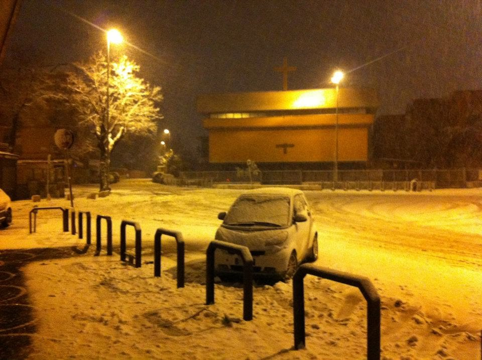 Neve a La Rustica. Sullo sfondo la Chiesa di Nostra Signora di Czestochowa. Per altre foto